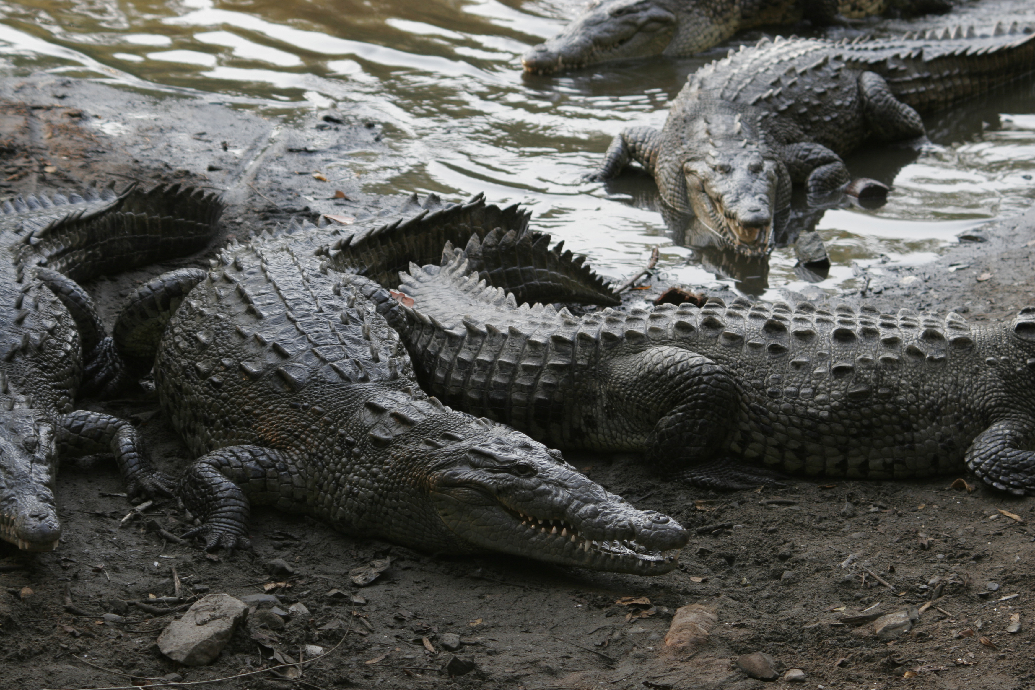 Crocodylus acutus, American Crocodile, Cocodrilo Americano. Photo taken at La Manzanilla, Jalisco, Mexico